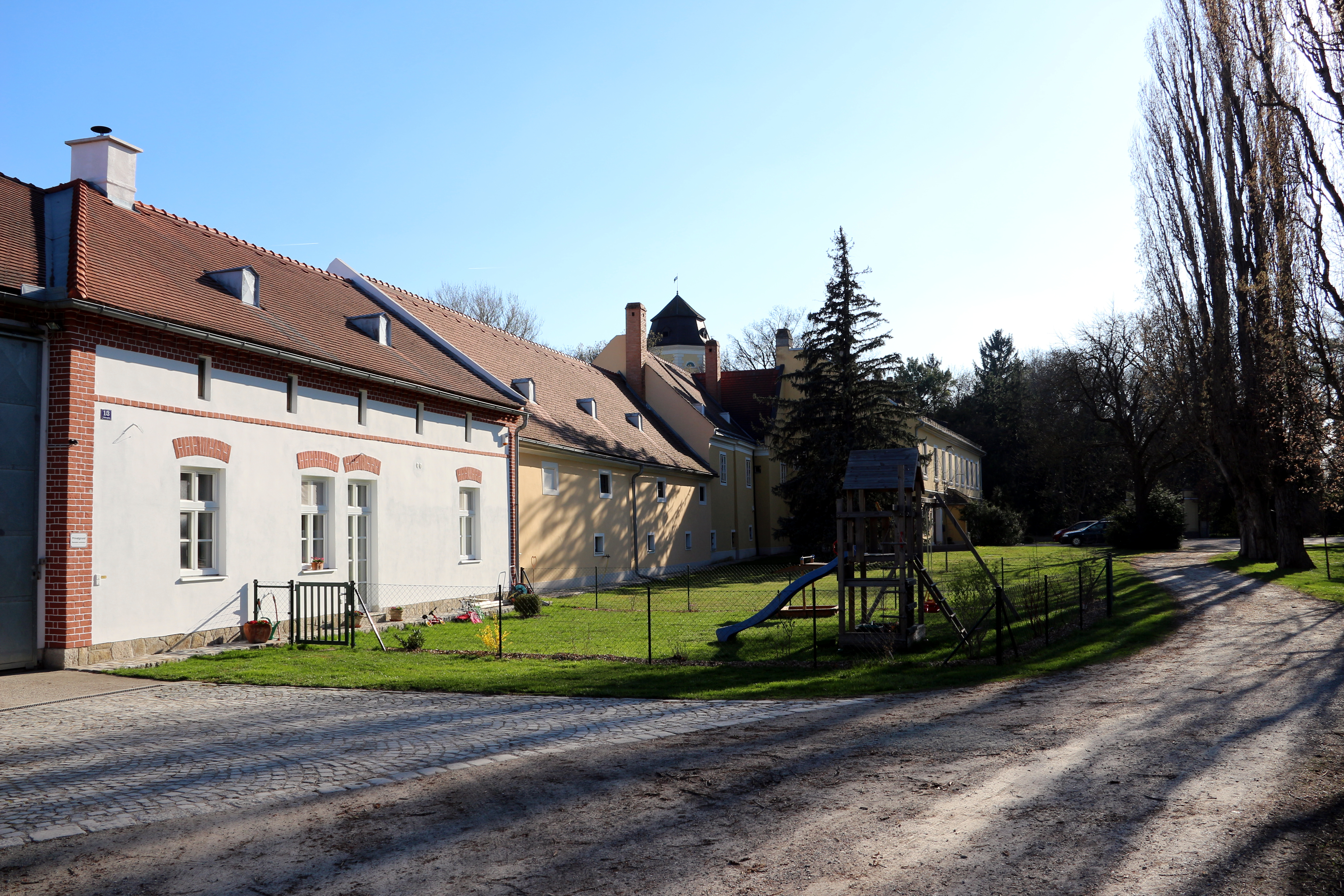 Schloss Achau in der gleichnamigen Gemeinde, Niederösterreich.